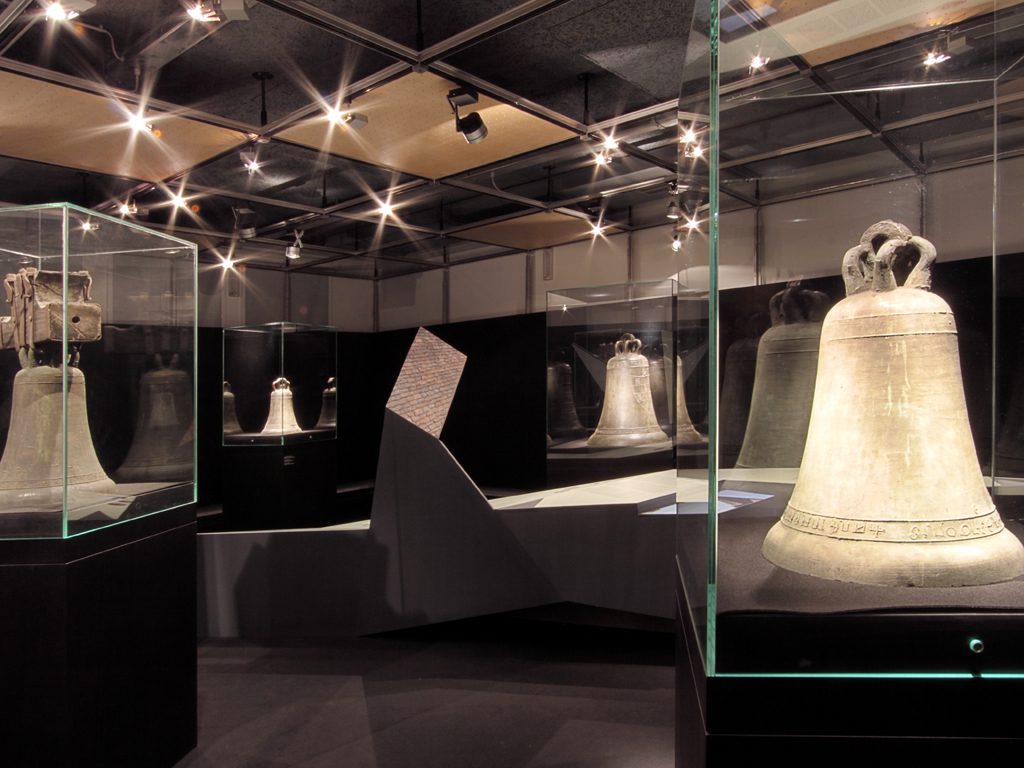 Vista della mostra "Ascolta, é ora..."